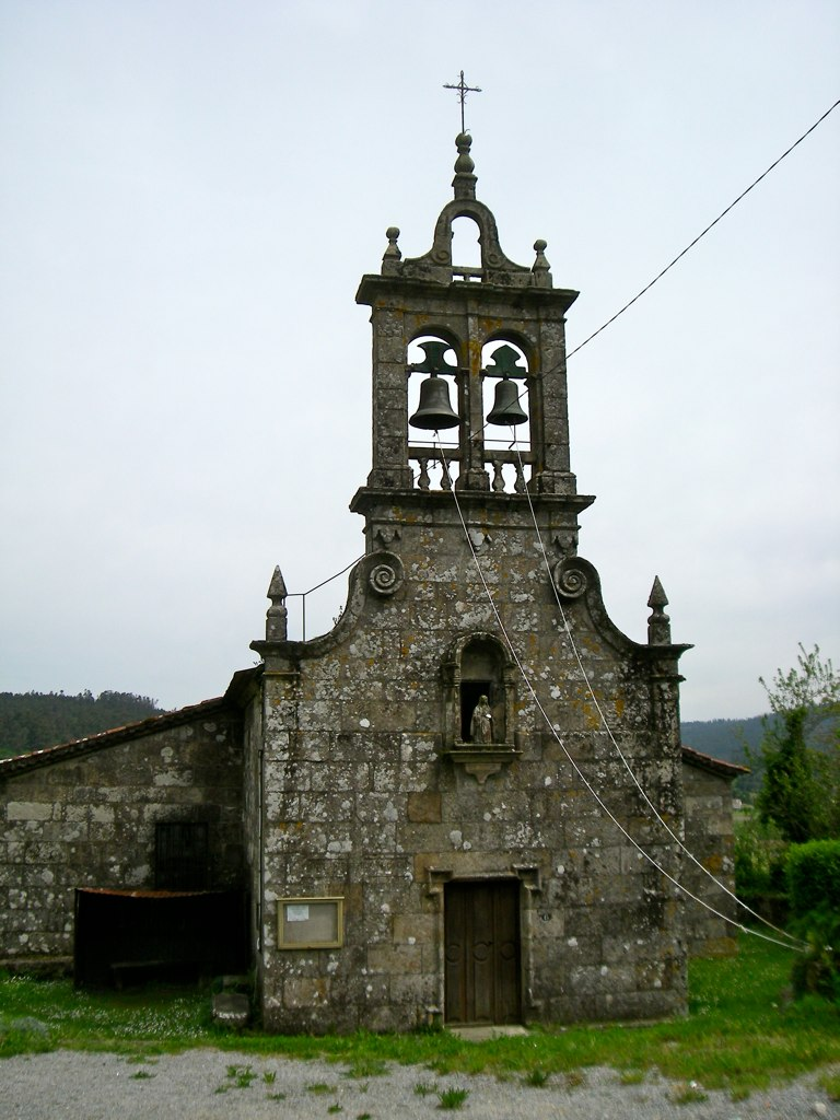 Igrexa de Portela